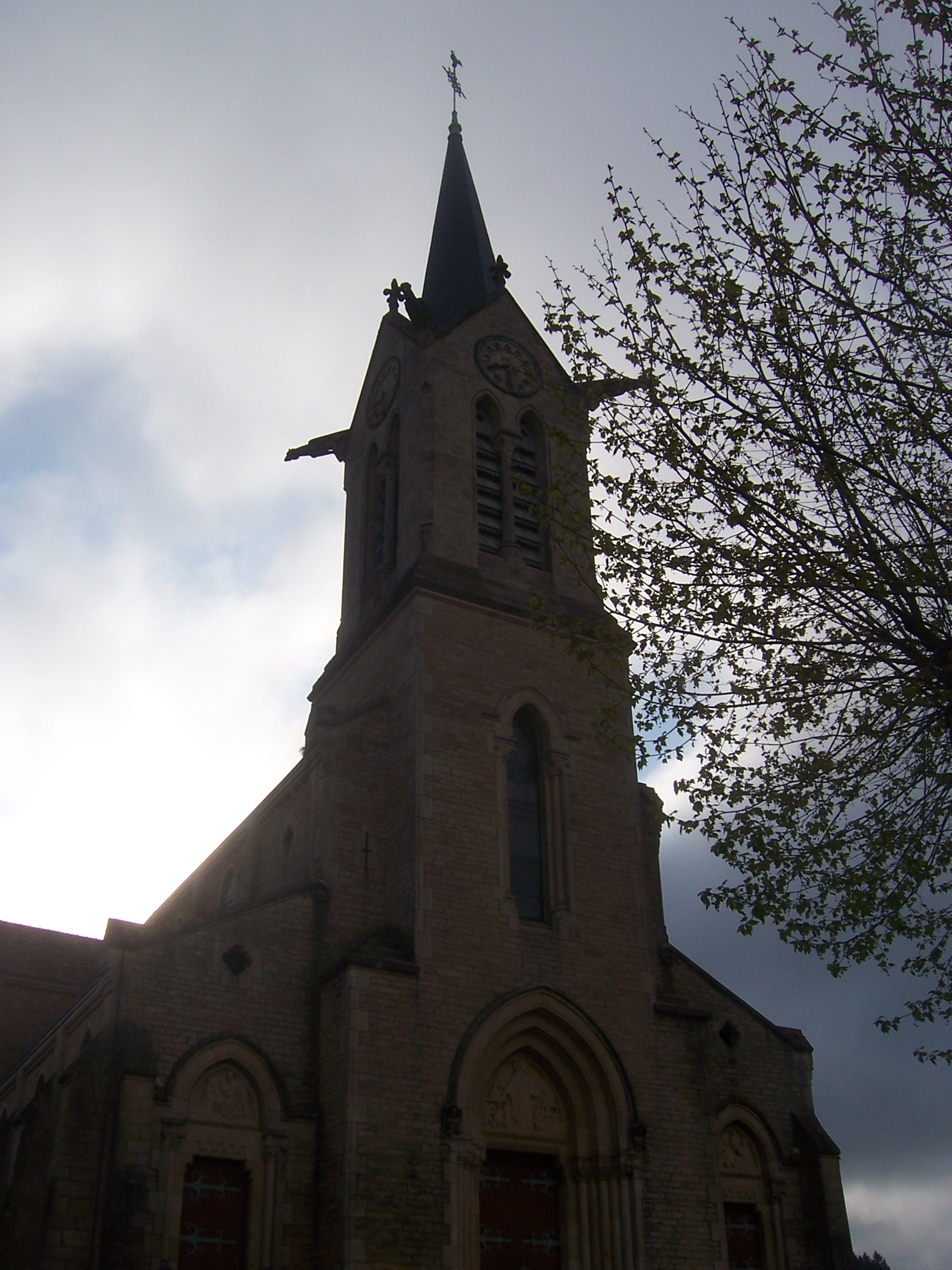 Eglise de Saint-Igny-de-Roche